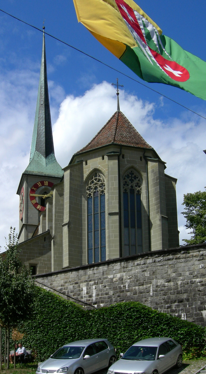 Burgdorf, Pfarrkirche